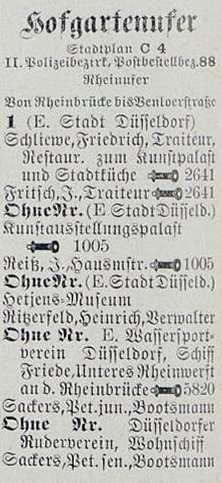 Hofgartenufer im Adressbuch 1910: Nr. 1 Restauration zum Kunstpalast; ohne Nr. Kunstausstellungspalast; ohne Nr. Hetjens-Museum; – direkt am Rhein ohne Nr. Wassersportverein Düsseldorf, Schiff Friede, Unteres Rheinwerft an der Rheinbrücke und Düsseldorfer Ruderverein 1880, Wohnschiff